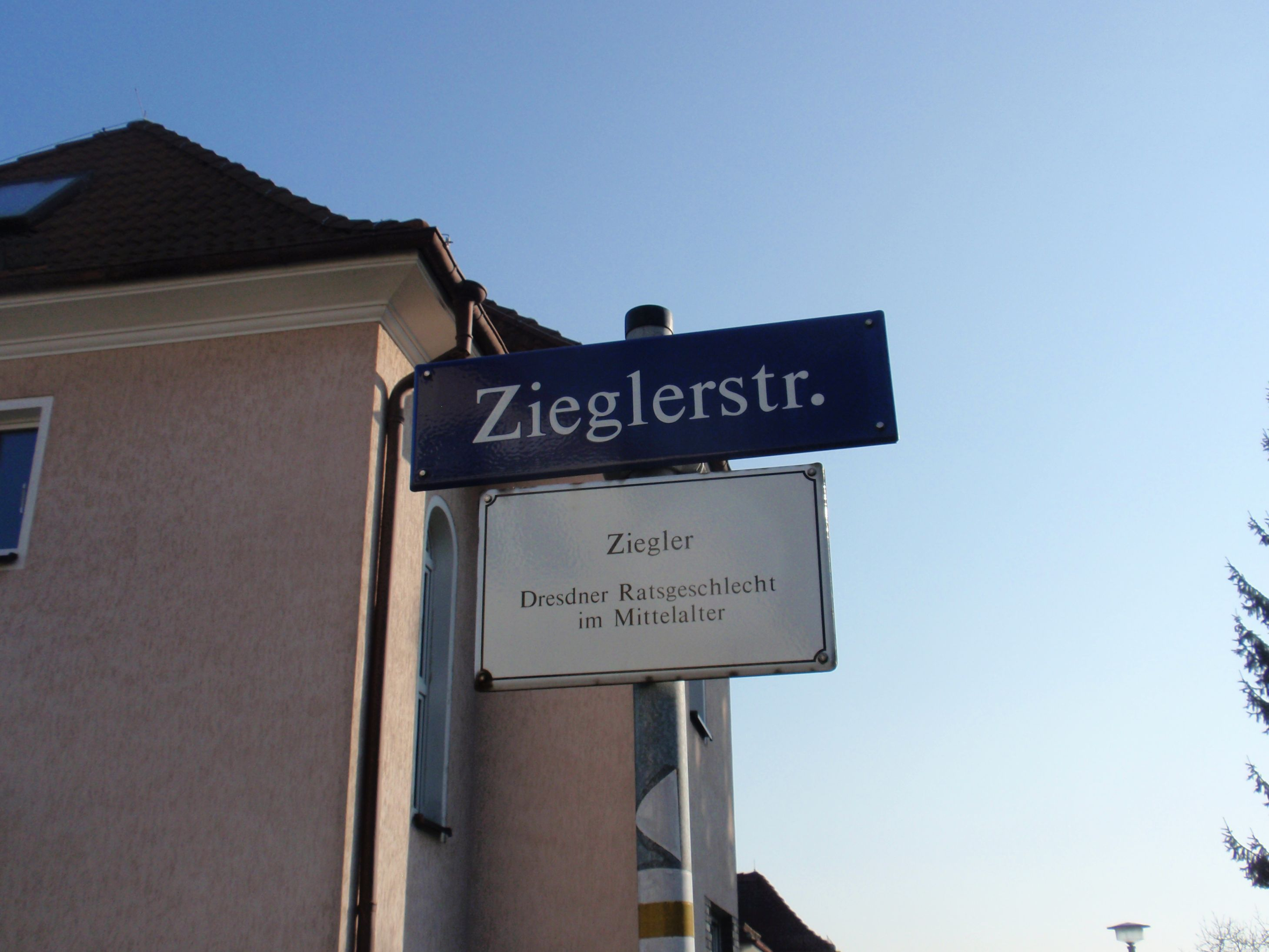 Zieglerstraße i Dresden. Gaten er oppkalt etter rådsherreslekten Ziegler.